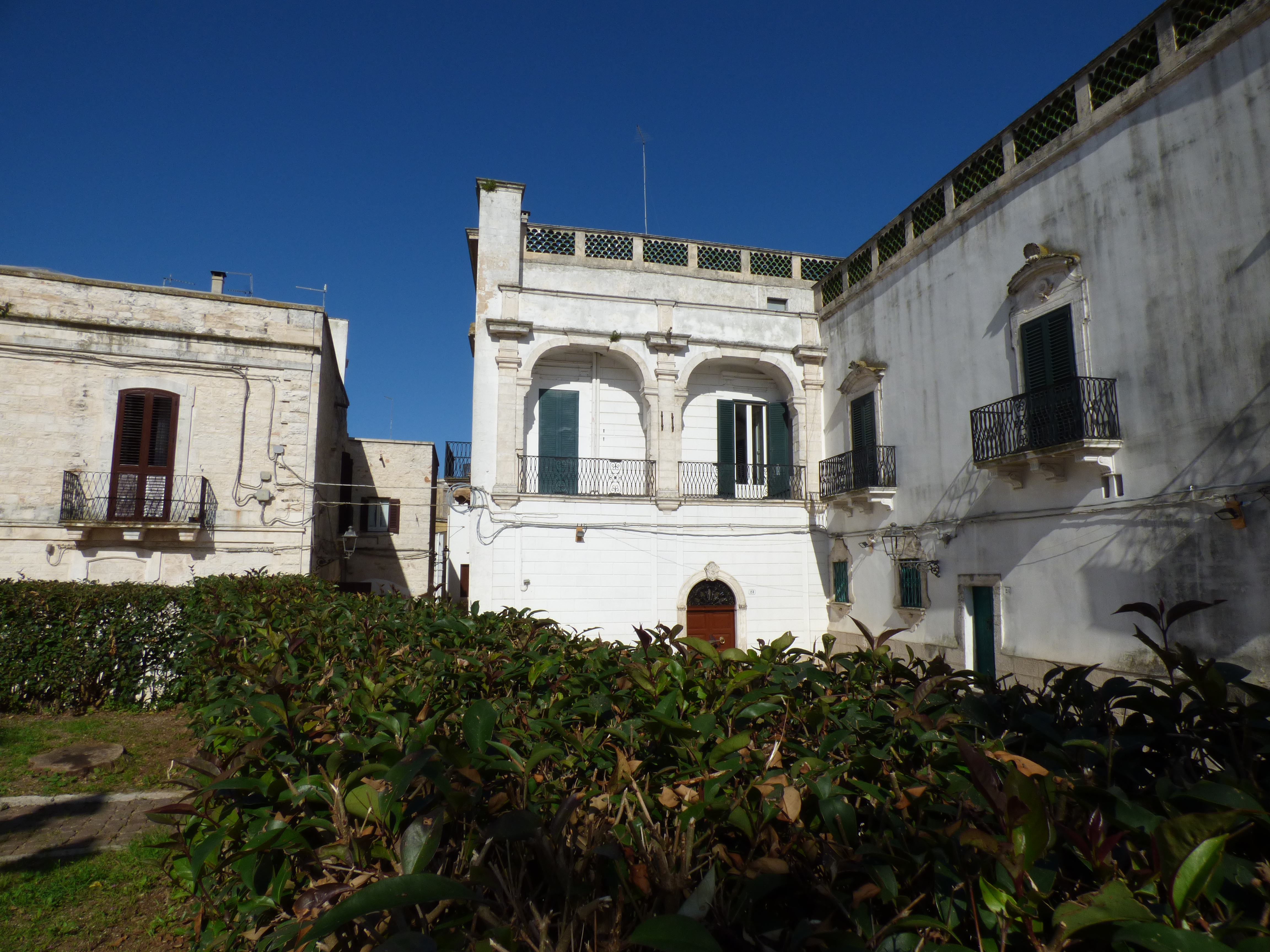 Palazzo Allegretti, sito nel centro storico.